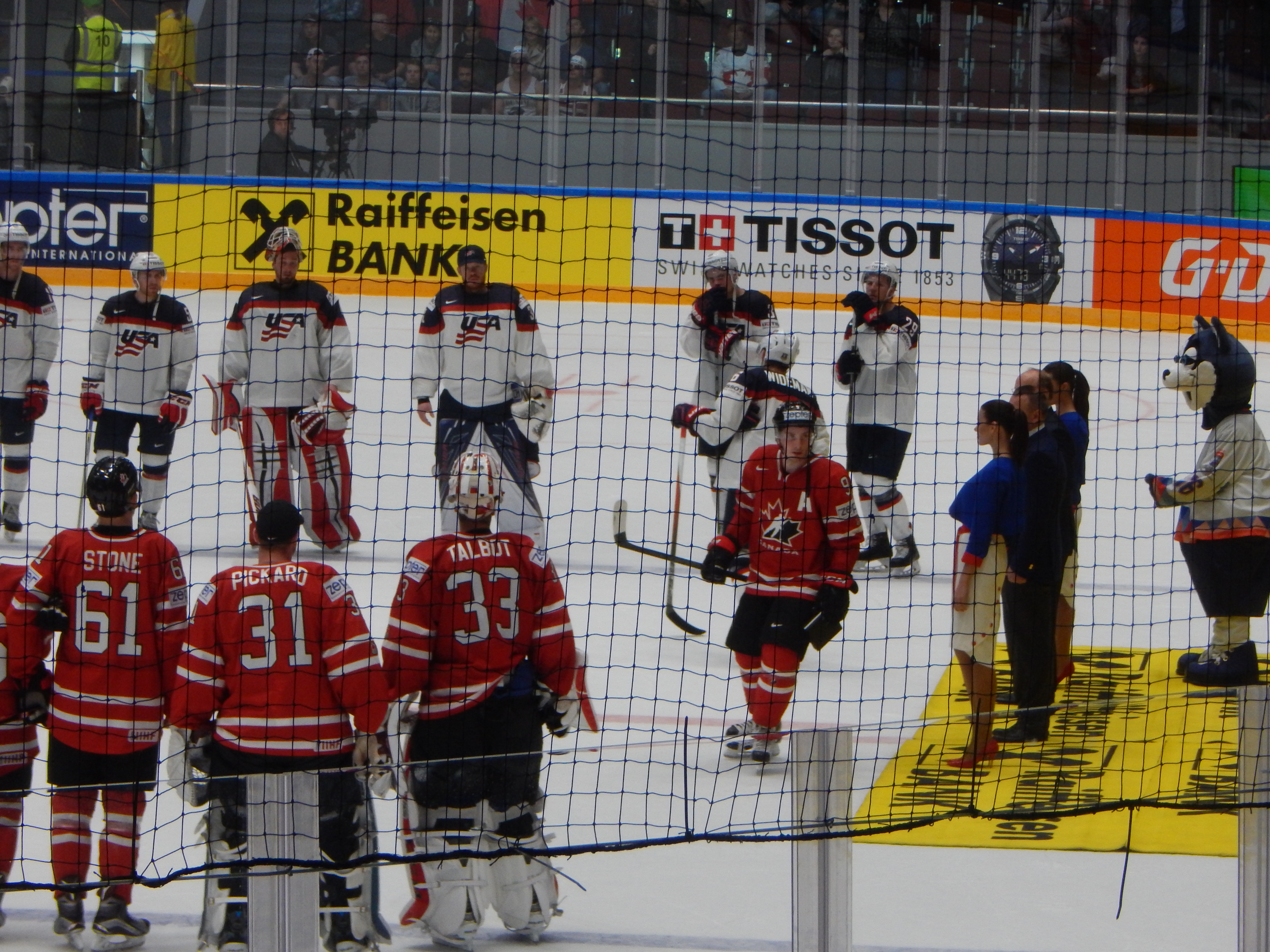 Мэтт Дюшен и Крис Вайдман - лучшие игроки матча-открытия чемпоината мира 2016 в составе своих команд